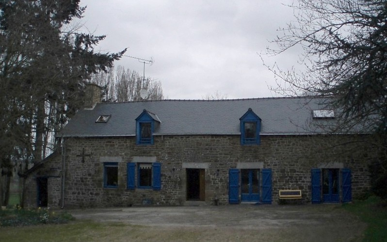 Longère à Ernée, Mayenne (France).